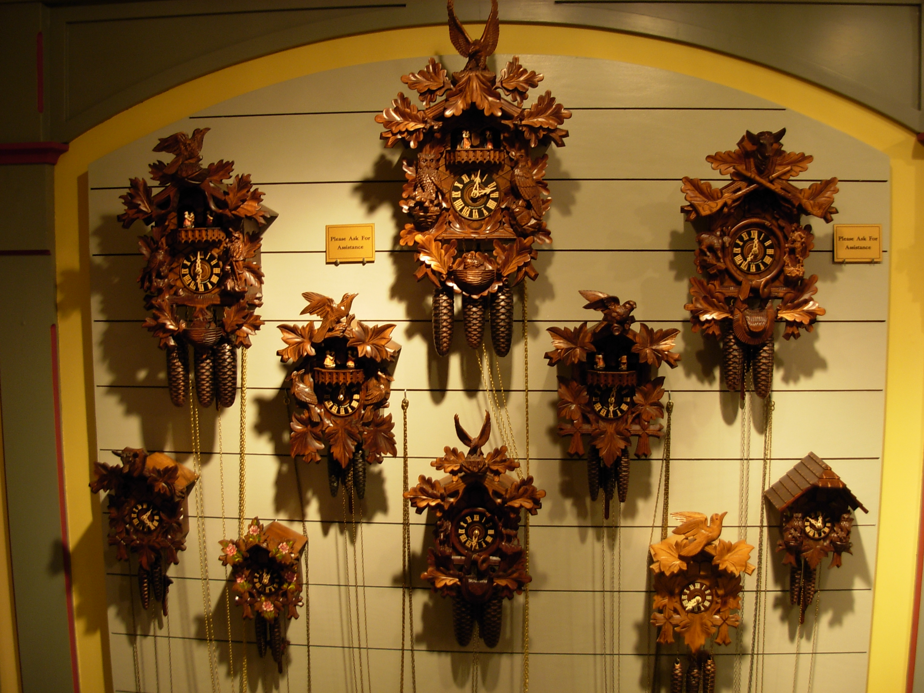 Busch Gardens Europe, Williamsburg Roller coasters Amusement rides